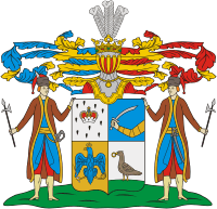 Герб из Общего гербовника дворянских родов Российской империи